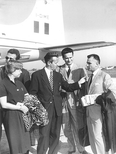 il giornalista Carlo Mazzarella intervista Mario Monicelli e Giulietta Masina Licensing Categoria:Immagini di Giulietta Masina Categoria:Immagini di Mario Monicelli